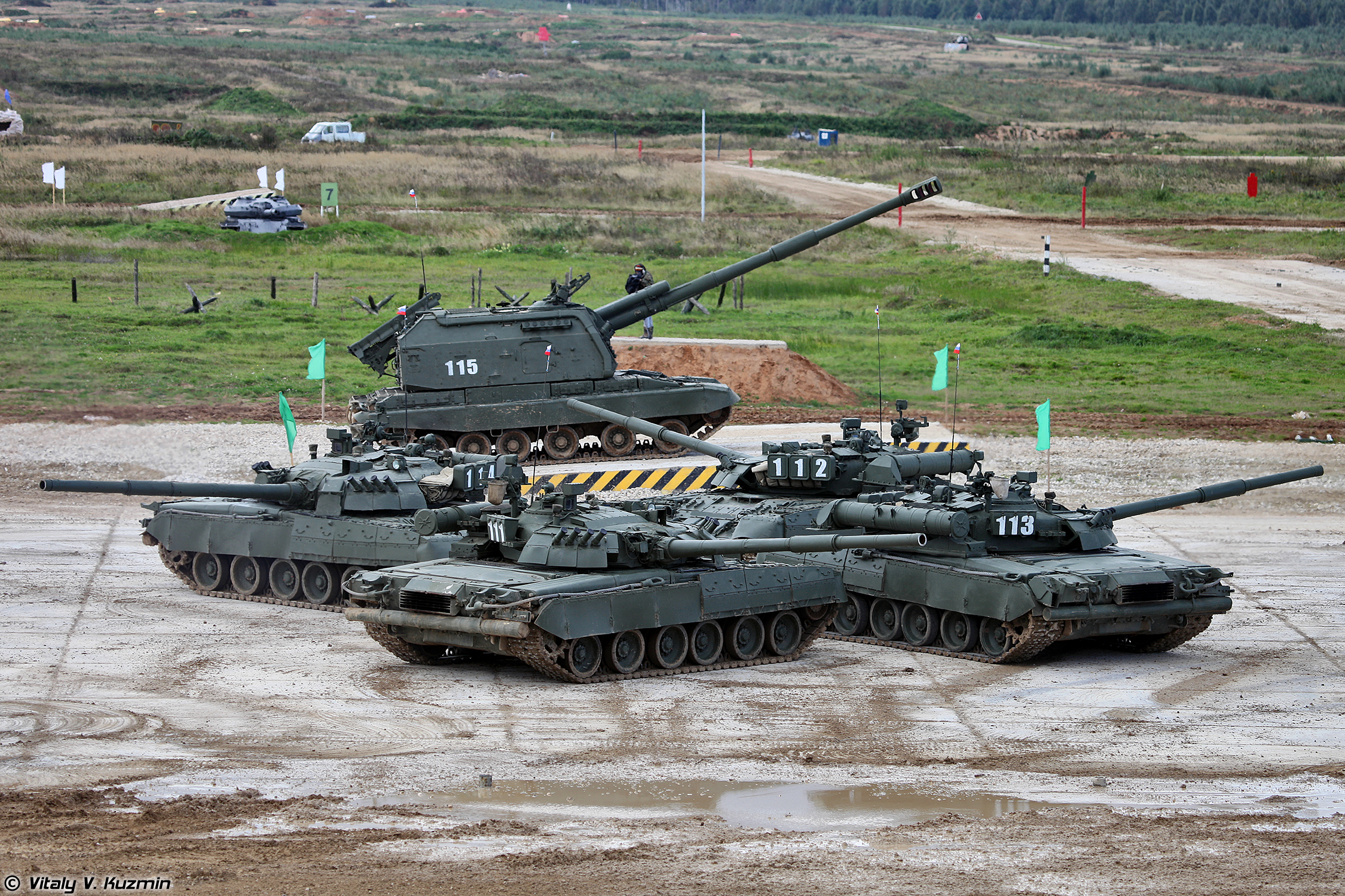 Танковый балет (Tank ballet)